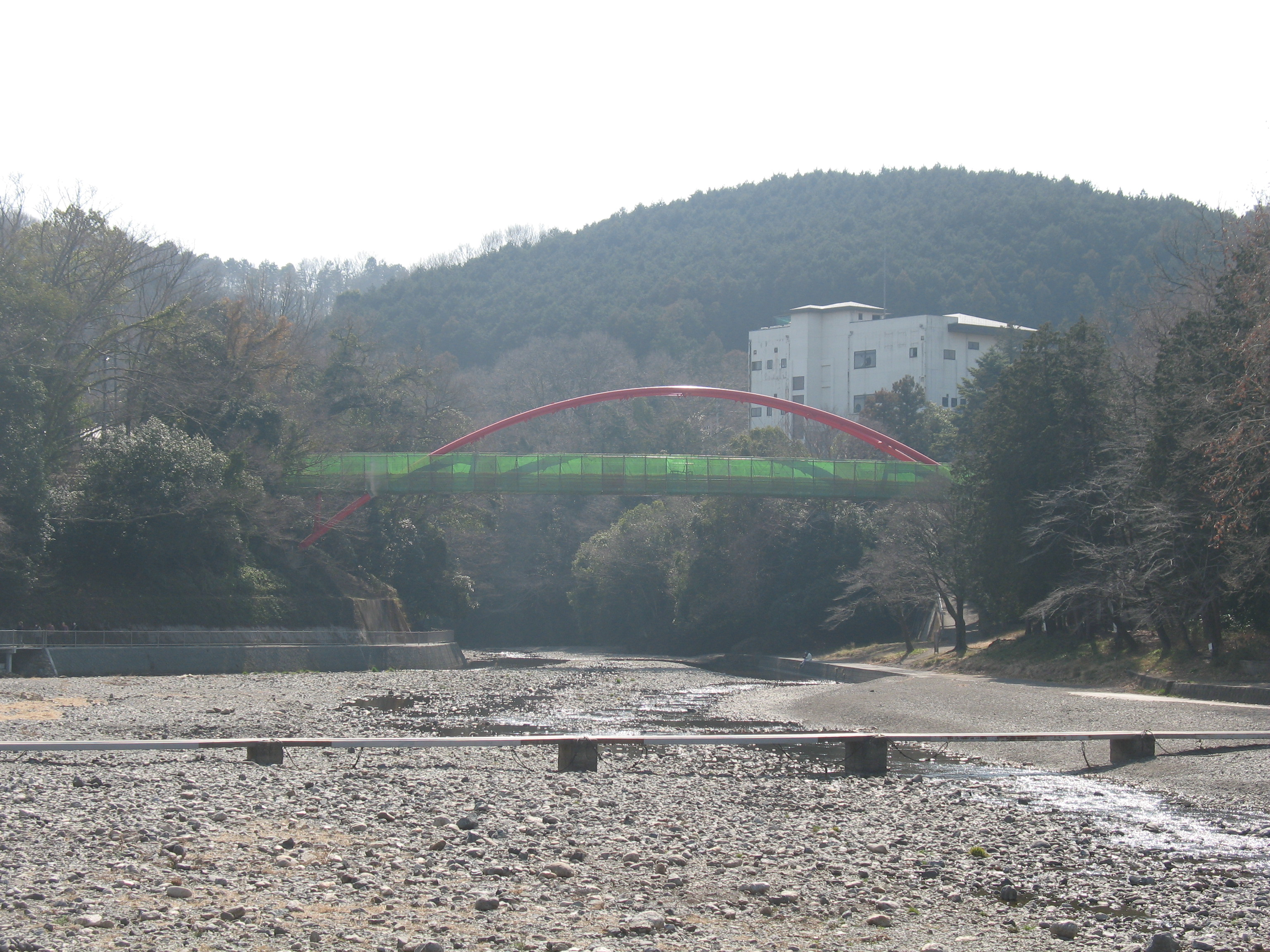 飯能市久下の飯能河原から下流（南）方向に見た入間川。赤い橋梁は割岩橋。 Canon PowerShot A620 Ik heb de GPS coördinaten toegevoegd aan het bestand. De foutenmarge moet tussen ±20 meter liggen. --トトト (talk) 14:49, 22 September 2018 (UTC)